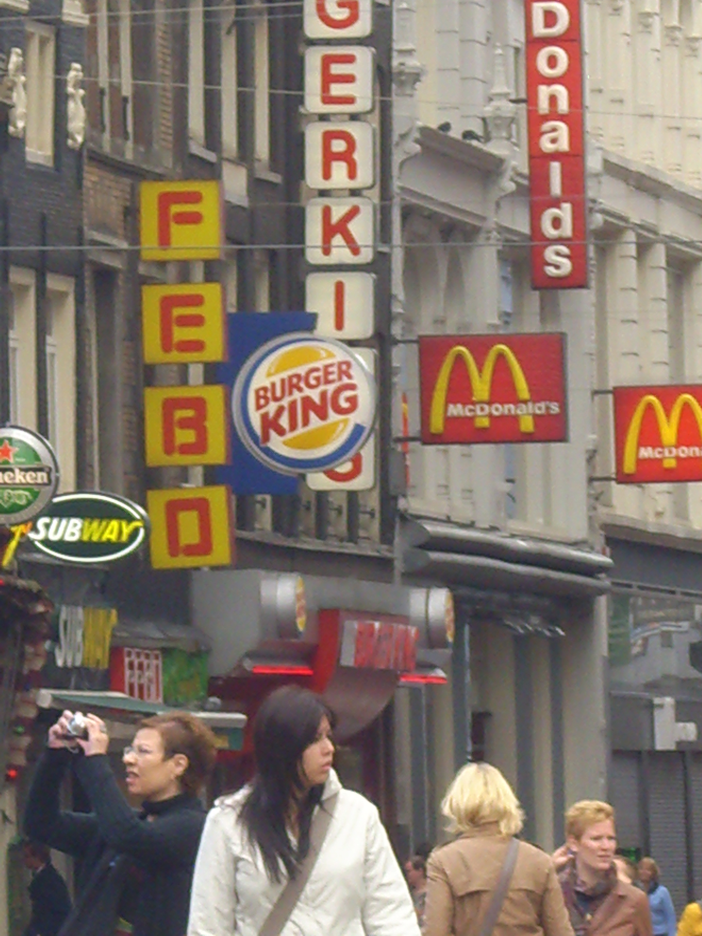 Fastfood-Ketten (McDonald's, Burger King, Febo, Subway) in Amsterdam